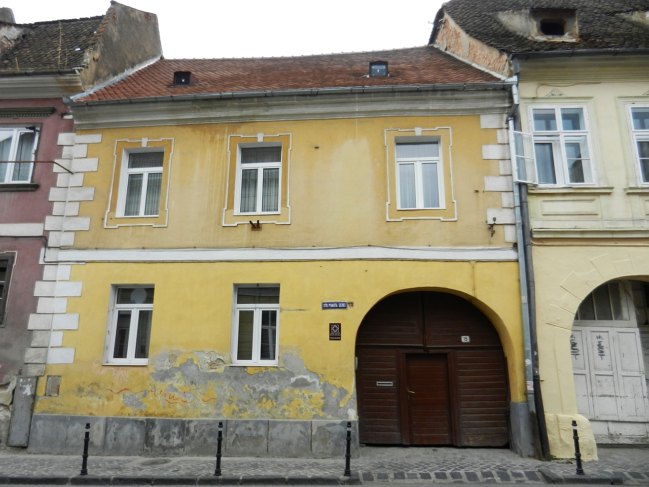 Casă monument istoric